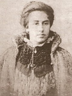 Manuela de Paula Ferreira, imagem do século XIX